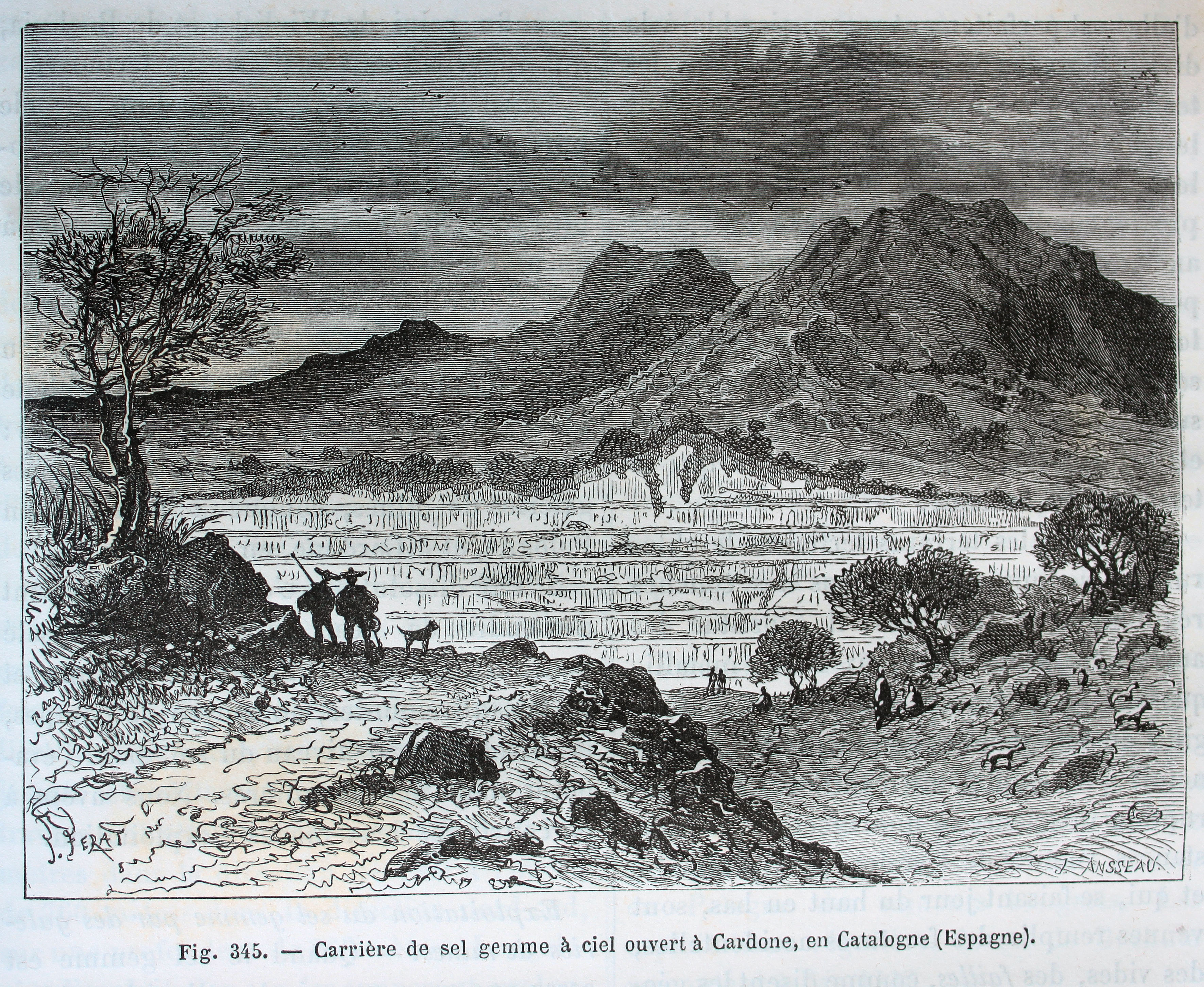 Ilustraciones de la obra : Les merveilles de l'industrie ou, Description des principales industries modernes / par Louis Figuier. - Paris : Furne, Jouvet, [1873-1877]. - Tome I